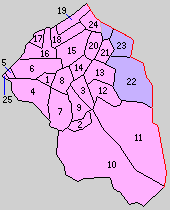 石川県江沼郡の町村制施行時の町村。